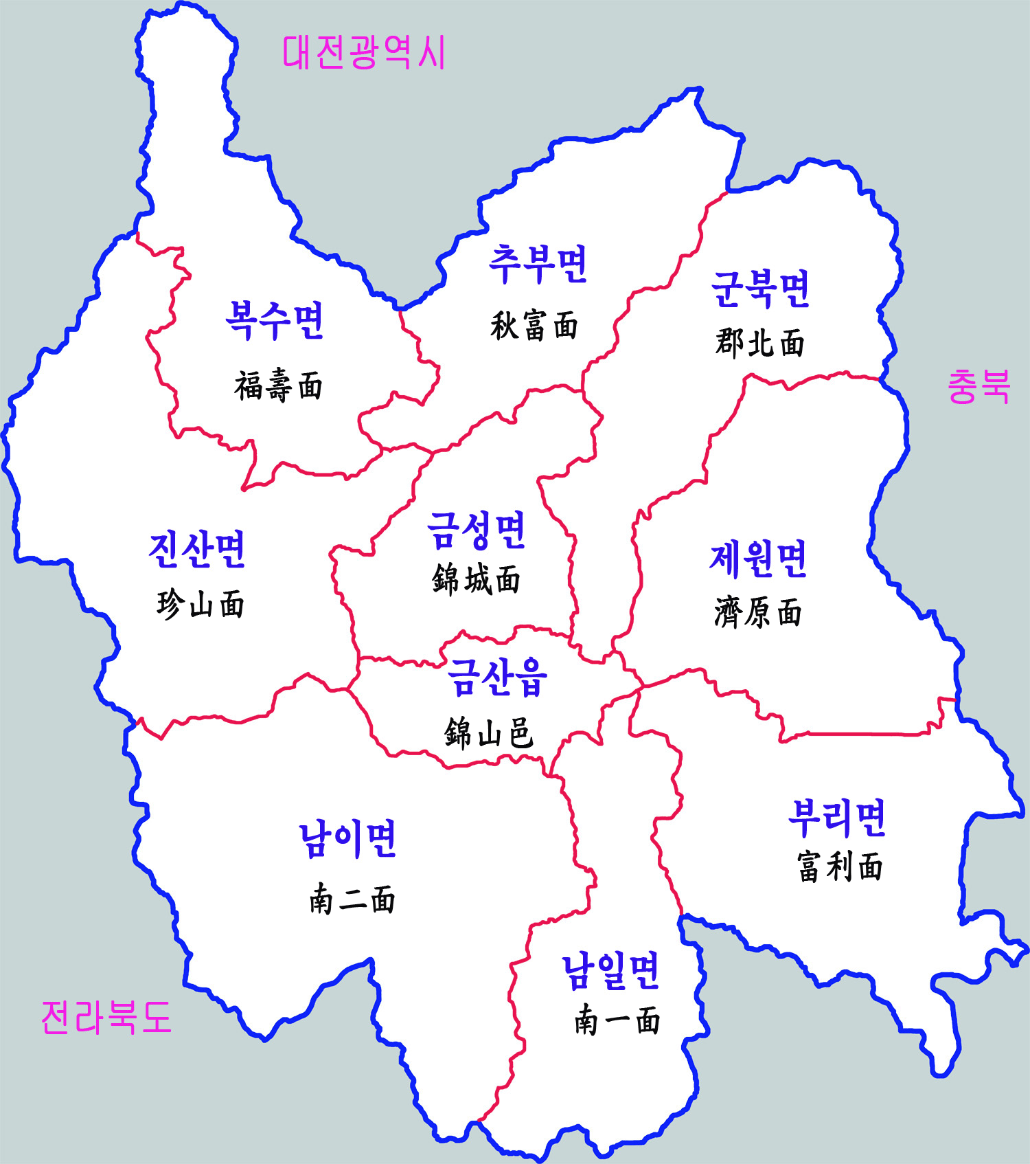 충남 금산군 행정구역도